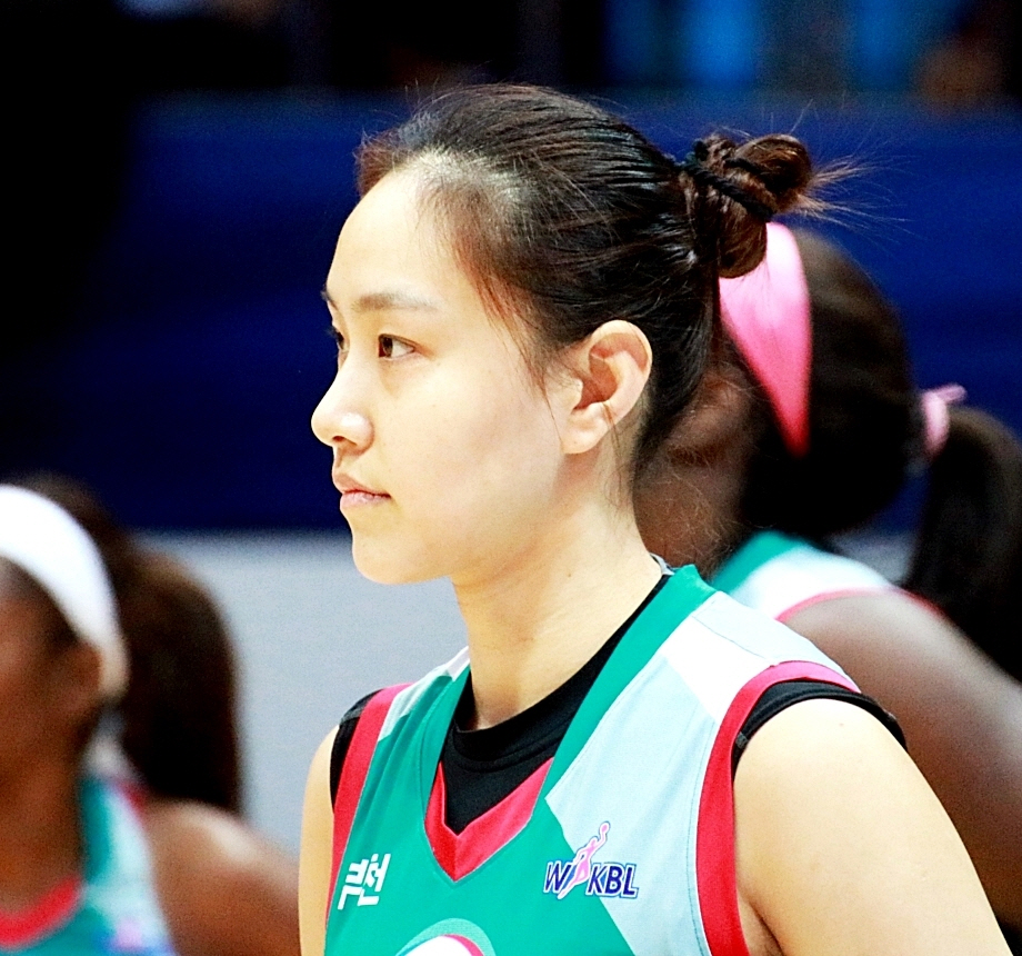 160210 여자농구 신한은행 vs 하나외환 직찍 1